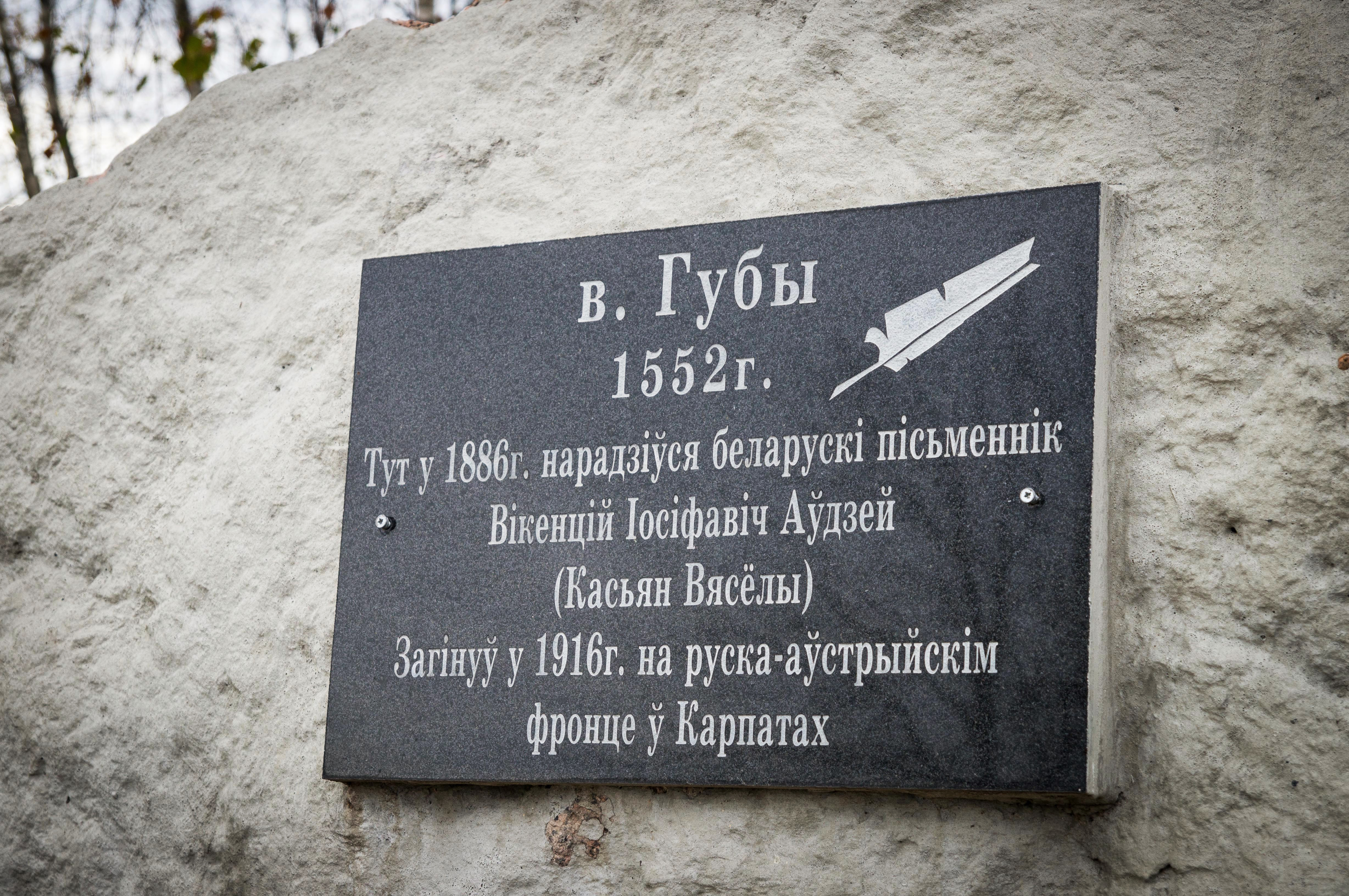 Памятны знак Касьяну Вясёламу